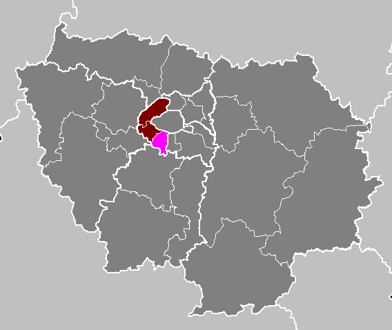 Maps of arrondissements and cantons of France: Département des Hauts-de-Seine - Arrondissement d Antony.PNG (Région Île-de-France)